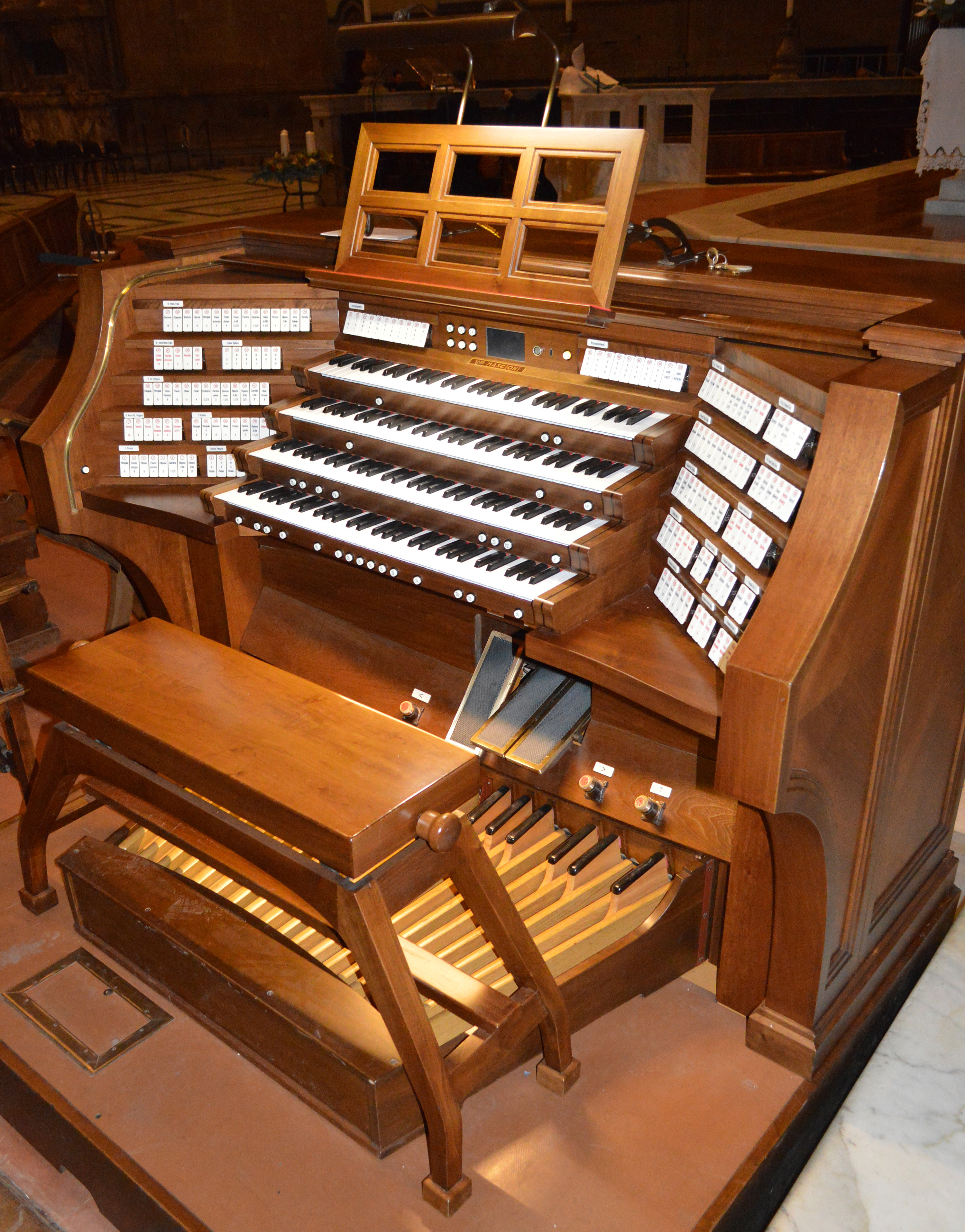 La consolle a quattro manuali, situata all'interno dell'ottagono del coro.